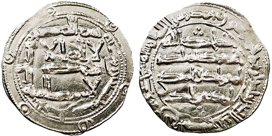 Dírham de Al-Hàkam I, en plata. Encunyada l'any 190 de l'Hègira.